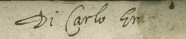 Signature de Carlo G, en titre de la table du manuscrit copié vers 1620.